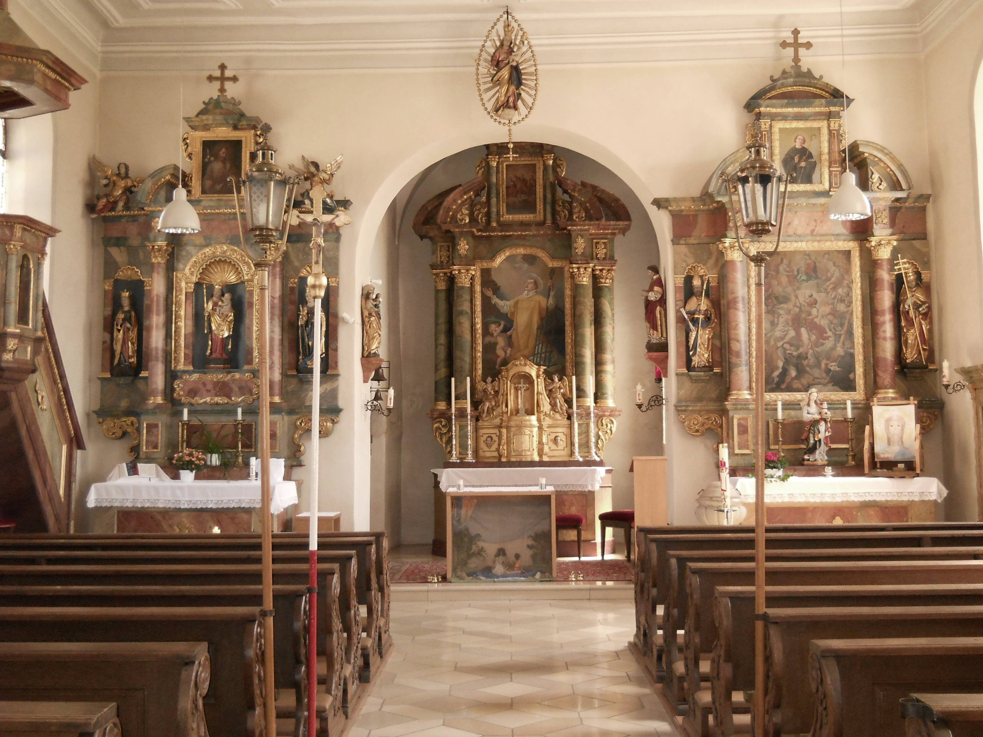 Schelldorf, Gemeinde Kipfenberg im oberbayerischen Landkreis Eichstätt, barocke Ausstattung der alten Pfarrkirche St. Laurentius